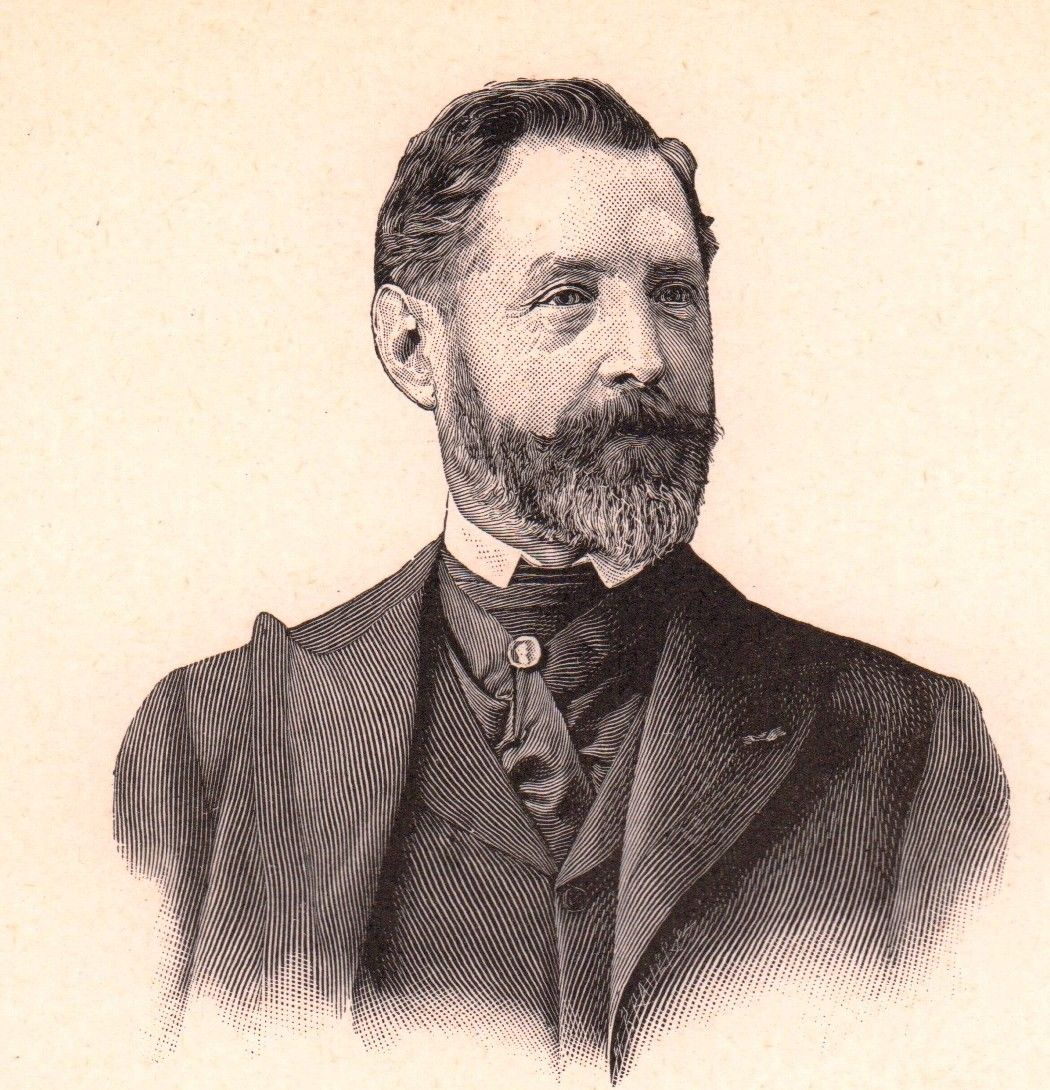 Jules Girardet